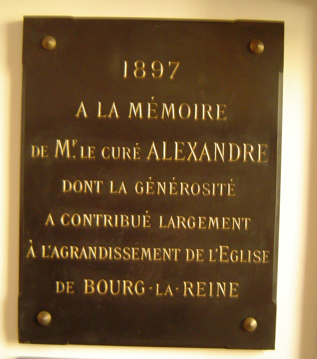 Photos prises à Bourg-la-Reine, commune française des Hauts-de-Seine